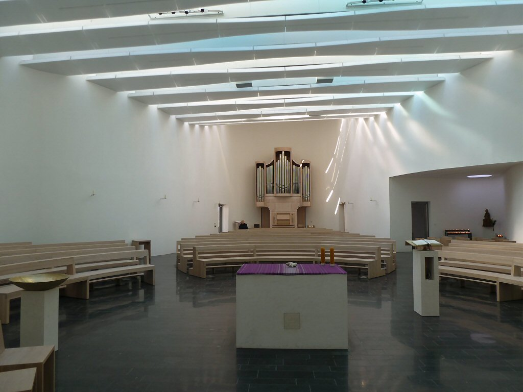 Innenraum der katholischen Kirche St. Marien in Schillig, Gemeinde Wangerland, Niedersachsen